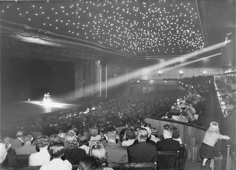 Deutsches Kulturleben im Kriege. Immer ausverkauftes Haus bei internationalem Programm auf Europas größter Varietebühne im Berliner Wintergarten. Reichsbahnzentrale für den Deutschen Reiseverkehr, Berlin